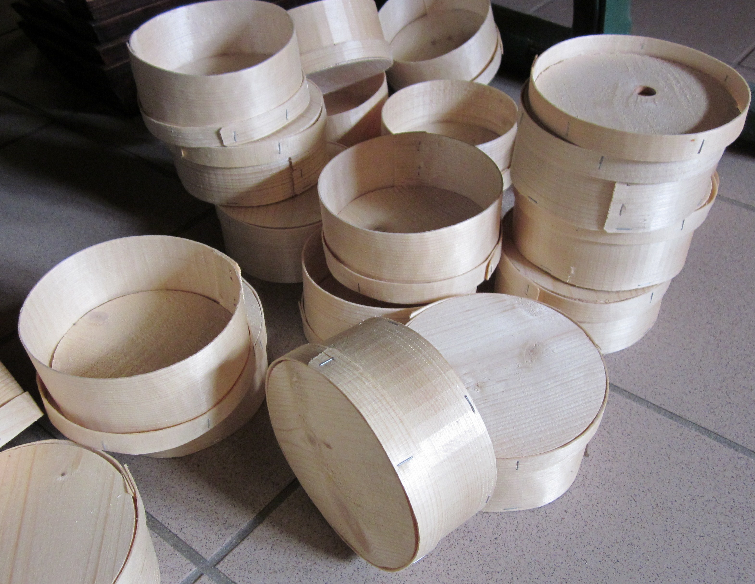 Boissellerie - boites fromage (en particulier le Vacherin Mont-d'Or )